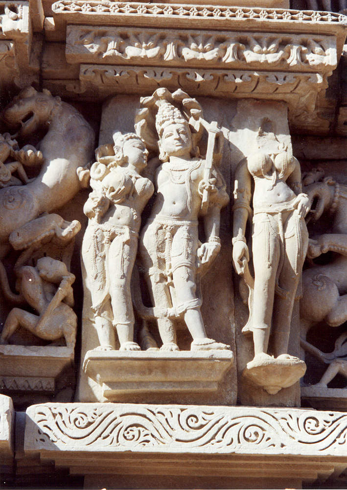 Erotische Darstellung am Tempel in Khajuraho